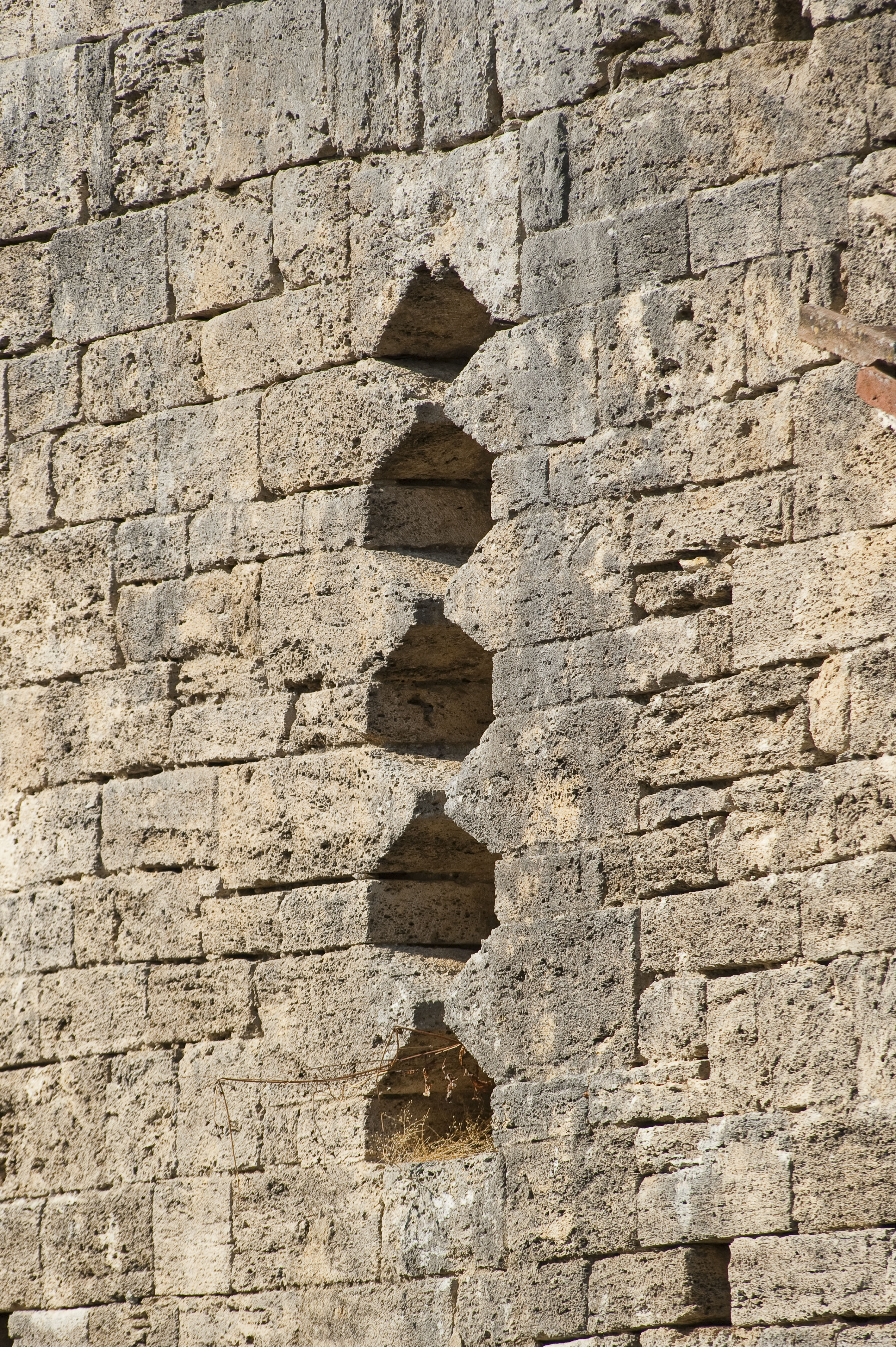 Monofora sulla facciata della chiesa di San Giovanni in Jerusalem alla Magione (Poggibonsi)